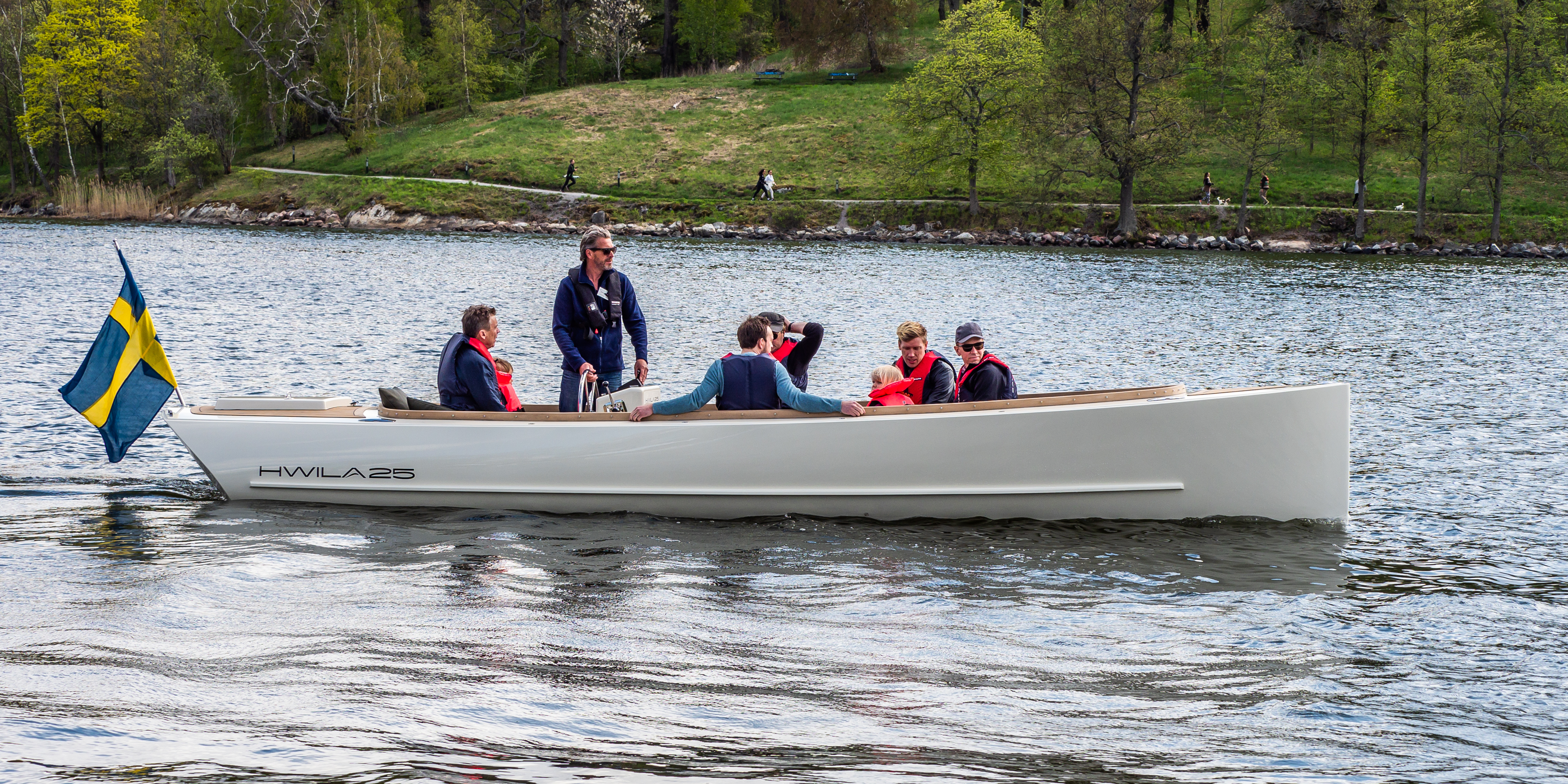 Electric boat